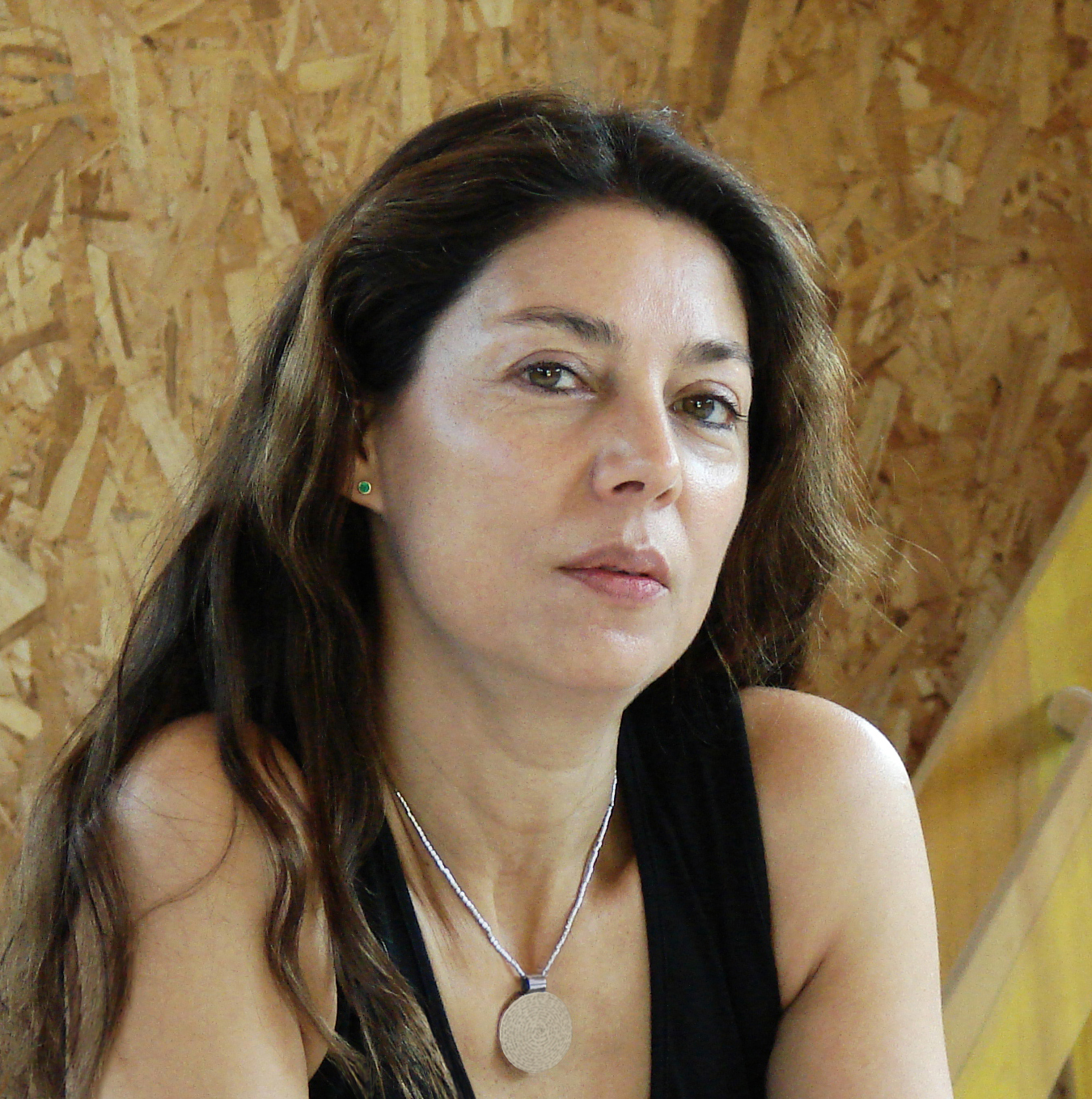 Alejandra Ruddoff ist eine chilenische Bildhauerin.